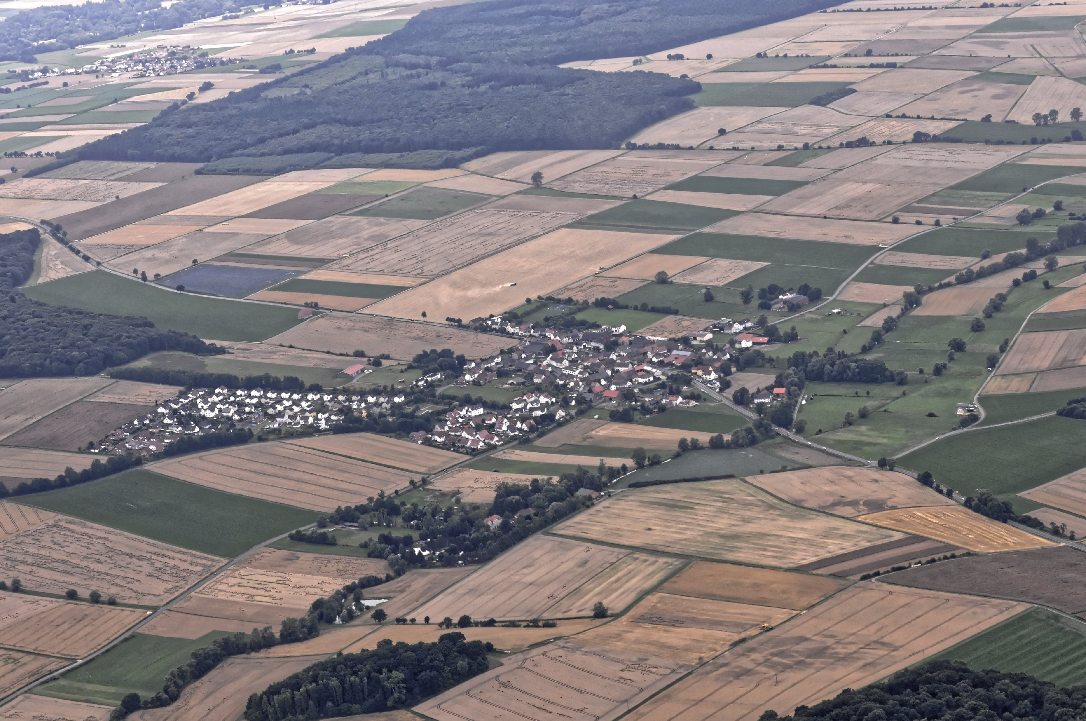 Bilder vom Flug Nordholz-Hammelburg 2015: Niedervorschütz, Staddtteil von Felsberg, Nordhessen. Im Hintergrund das Oberste Holz. Das Dorf Cappel am linken Bildrand.